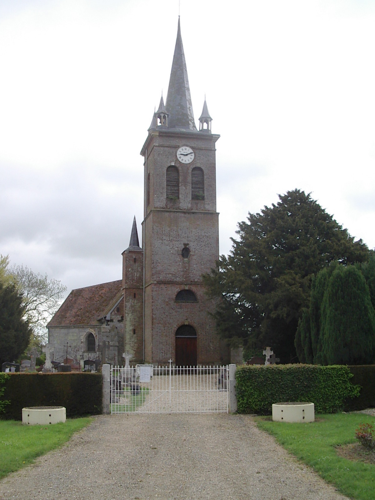 Eglise de La Roussière (France, Eure)